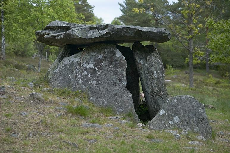 RAÄ-nummer Stala 81:1. Dösen vid Haga, megalitgrav från tidigneolitikum. Den består av fyra resta hällar och en takhäll. Motiv: Stala 81:1 Nyckelord: Riksintressen Kategori: Stenkammargrav RAÄ-nummer Stala 81:1. Dösen vid Haga, megalitgrav från tidigneolitikum. Den består av fyra resta hällar och en takhäll. Stala 81:1.